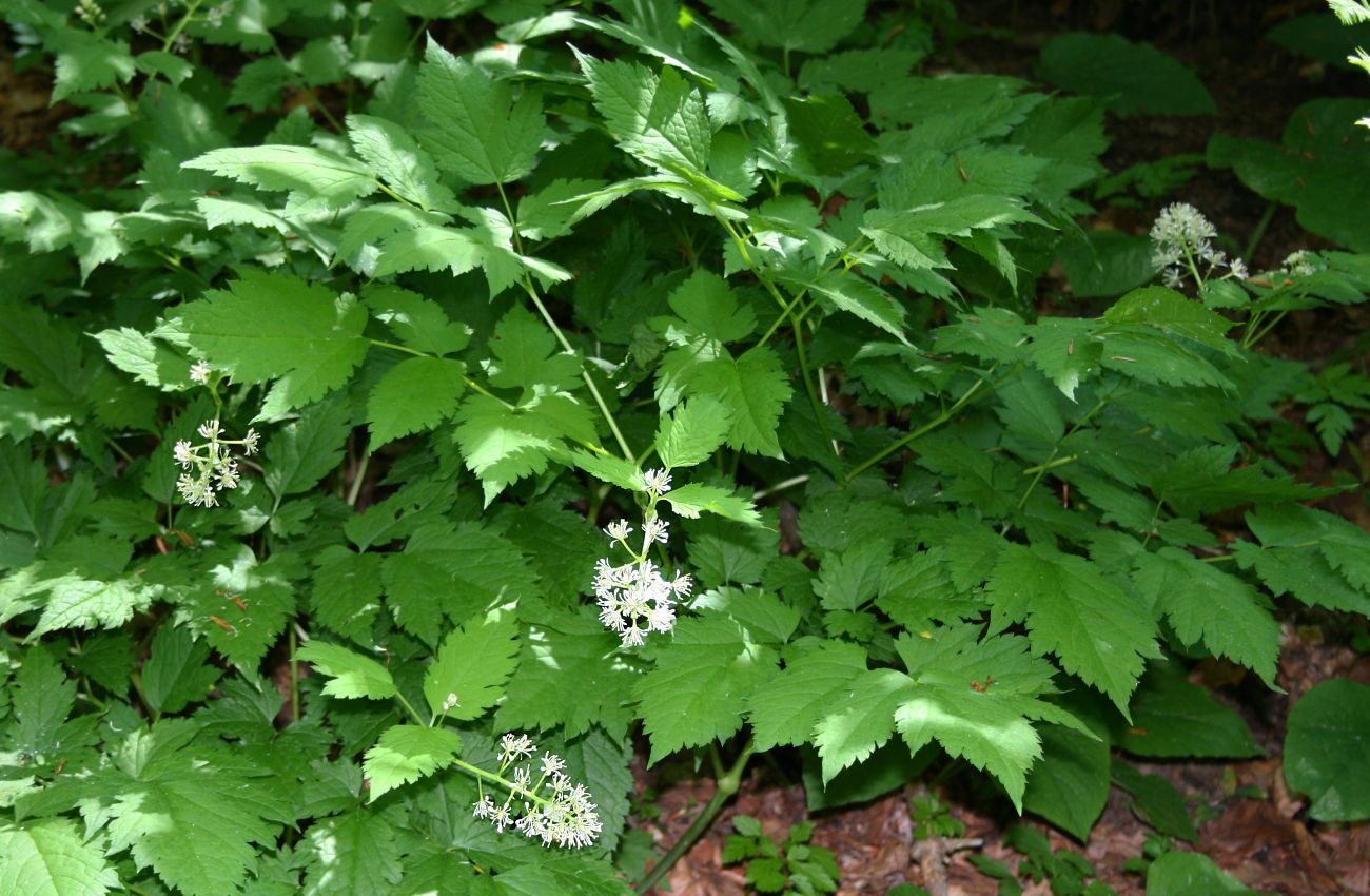 Actaea spicata, Hahnenfußgewächse (Ranunculaceae) - Türkei/Türkiye/Turkey: Prov. Bolu/Bolu ili, Bolu Dağları, ca. 2.7-2.8 km W Çeledoruğu Tepesi, Buchen-Tannenwald, ca. 1550 m